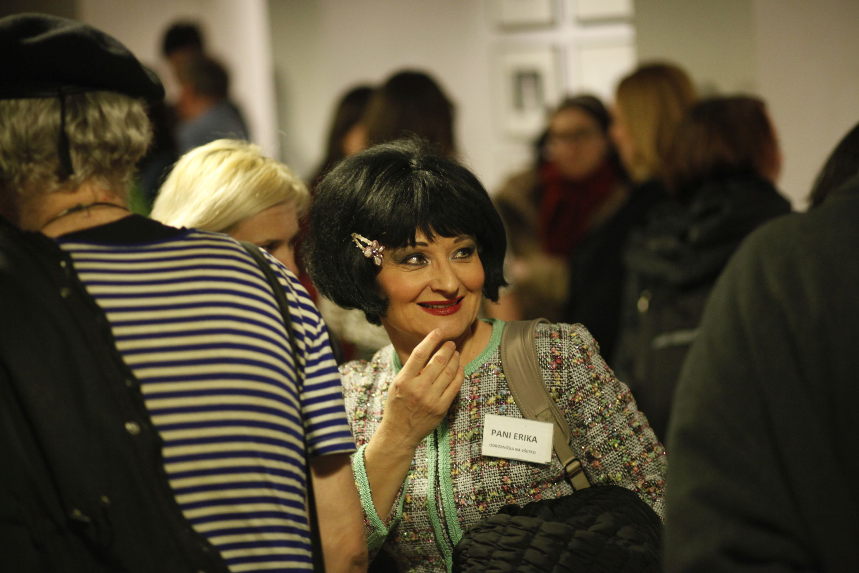 Z predstavenia Poradňa krásy Šereď